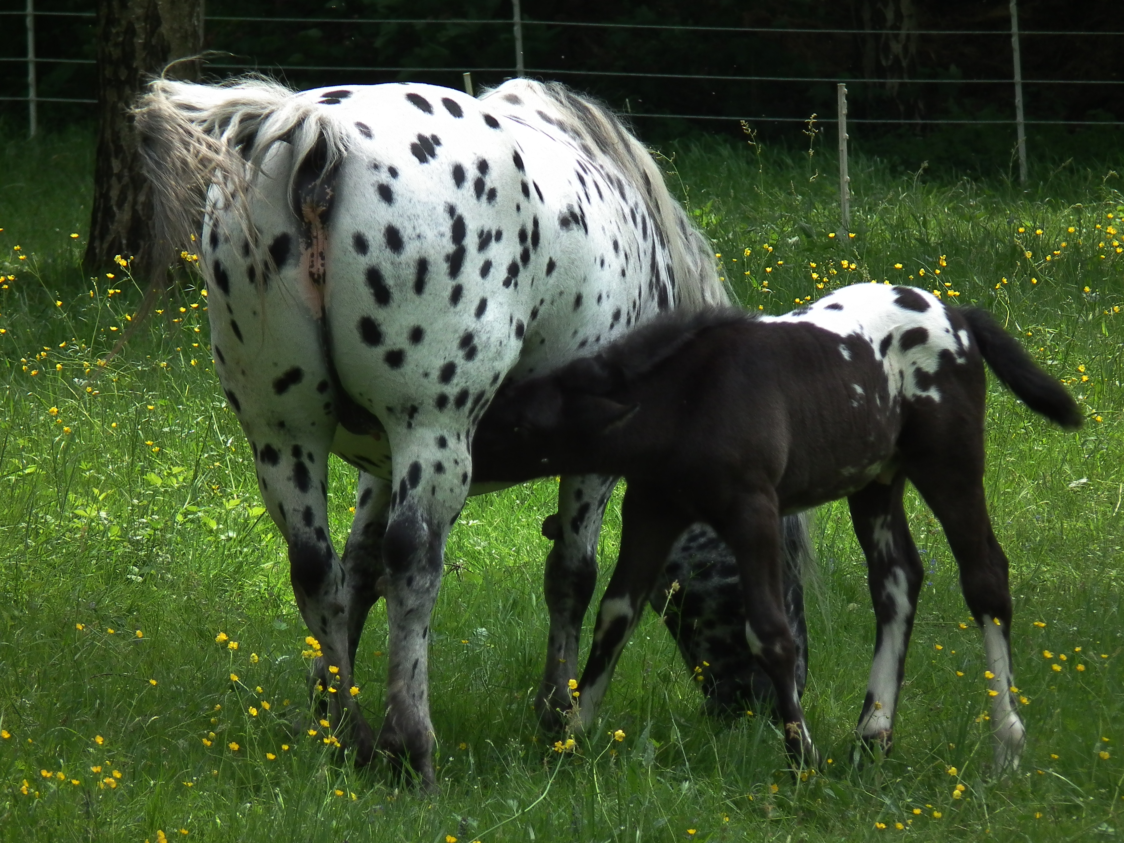 Stute mit Fohlen, fotografiert in Bretten (Baden-Württemberg, Deutschland)